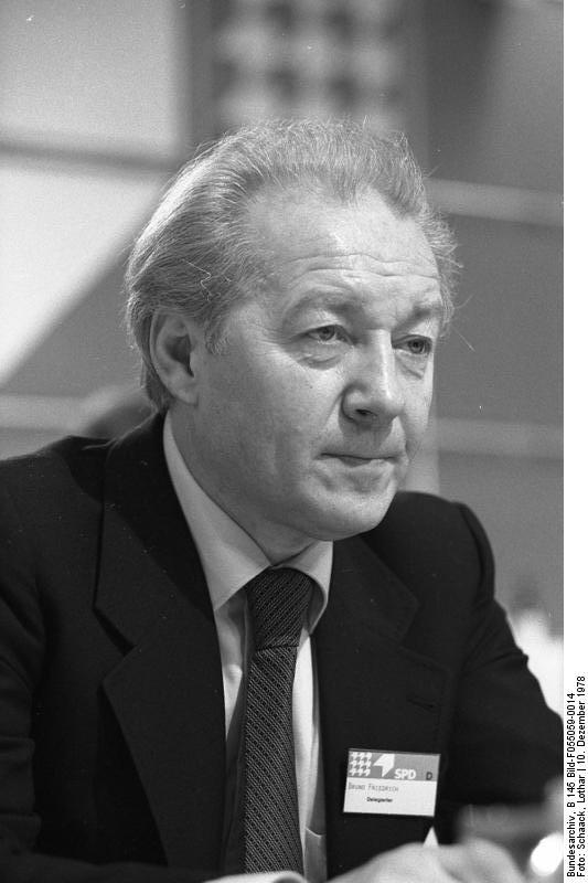 Außerordentlicher Parteitag der SPD im Messe-Kongreß-Zentrum in Köln zur Vorbereitung für die Europa-Parlament-Wahl 1979